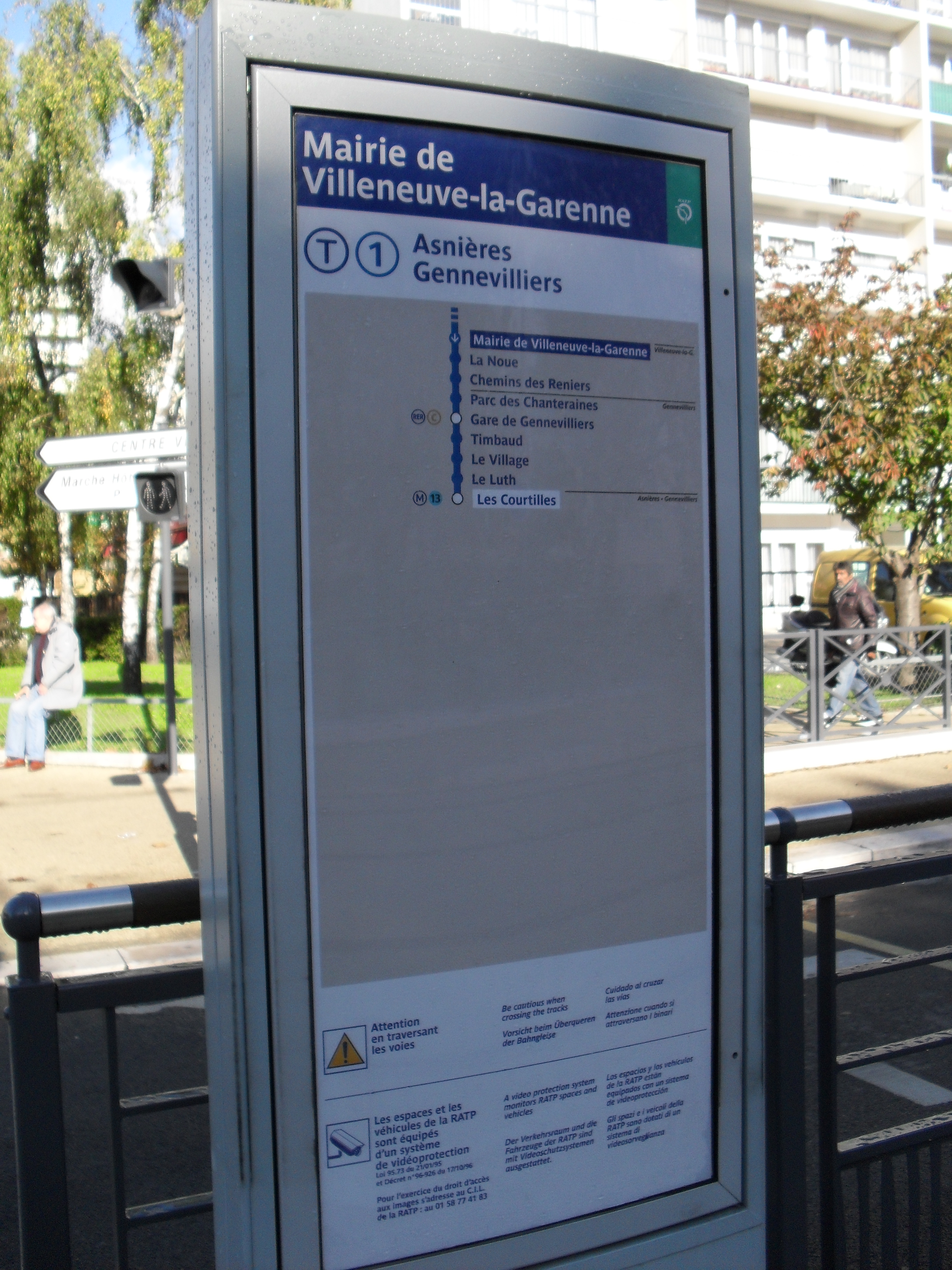 Paris Tramway ligne 1